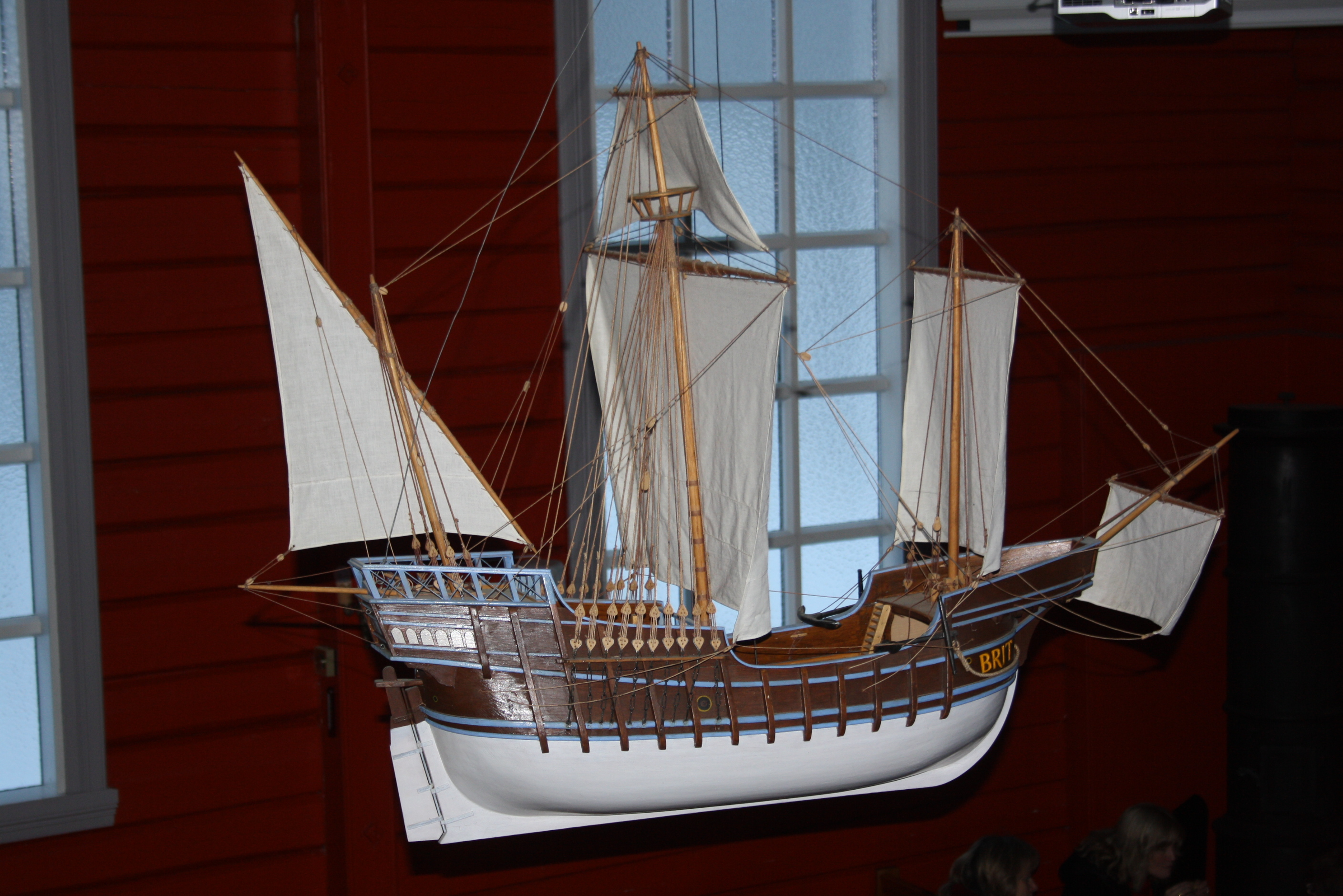 Skipet «Brit» i Grane kyrkje